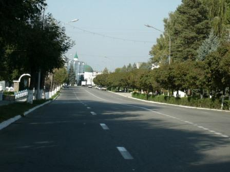 Центральная улица города Нарткала